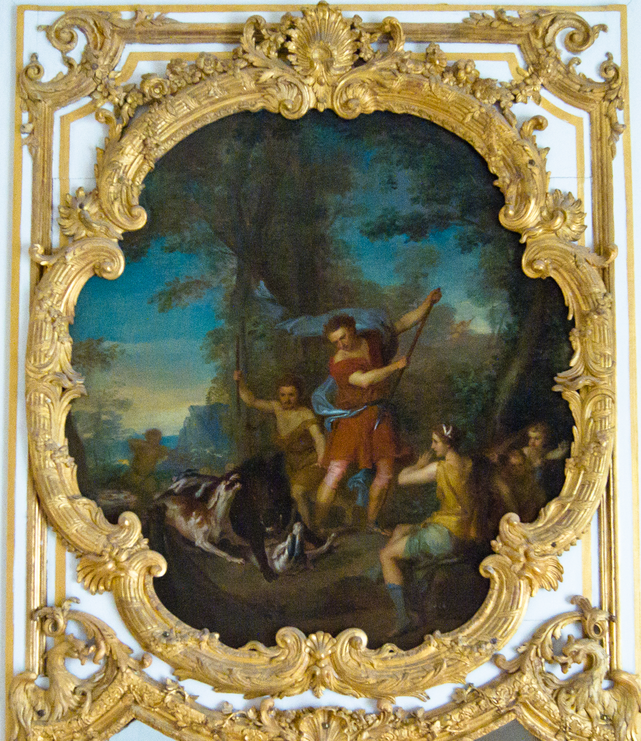 Tableau dans le cabinet des Dépêches au château de Versailles